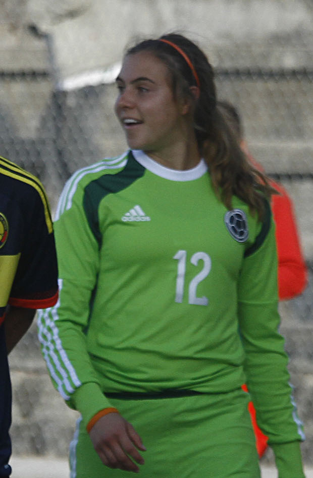 Tulcán, 11 abr (Andes).- La selección ecuatoriana de fútbol femenino perdió 4-1 este sábado en Tulcán (norte andino) ante Colombia en su tercer cotejo internacional preparatorio para el Mundial de Canadá. Foto: Micaela Ayala V./ANDES